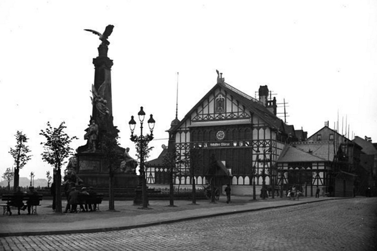 Duisburg, Schifferbörse Schifferbörse in Duisburg Ruhrort Zentralbild [Duisburg.- Schifferbörse am Ufer des Hafenmundes]